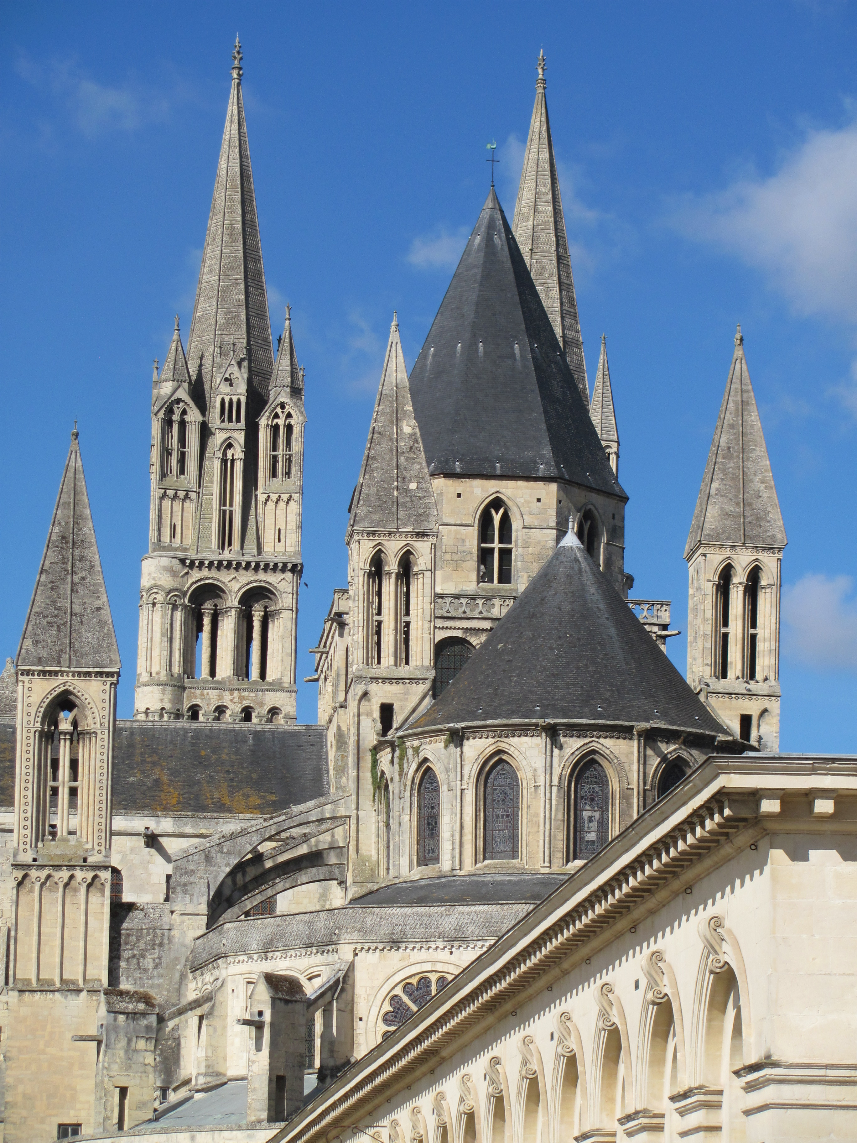 Аббатство Святого Стефана, Мужское аббатство (фр. Abbaye aux Hommes) — бывшее бенедиктинское аббатство во Франции, в городе Кан (Нижняя Нормандия). Вместе с женским аббатством Св. Троицы основано в 1059 году Вильгельмом Завоевателем. Закрыто в Великую французскую революцию, в настоящее время в бывших помещениях аббатства располагается муниципалитет, а бывшая монастырская церковь стала приходским храмом. В 1840 году аббатство включено в список культурного наследия Франции.